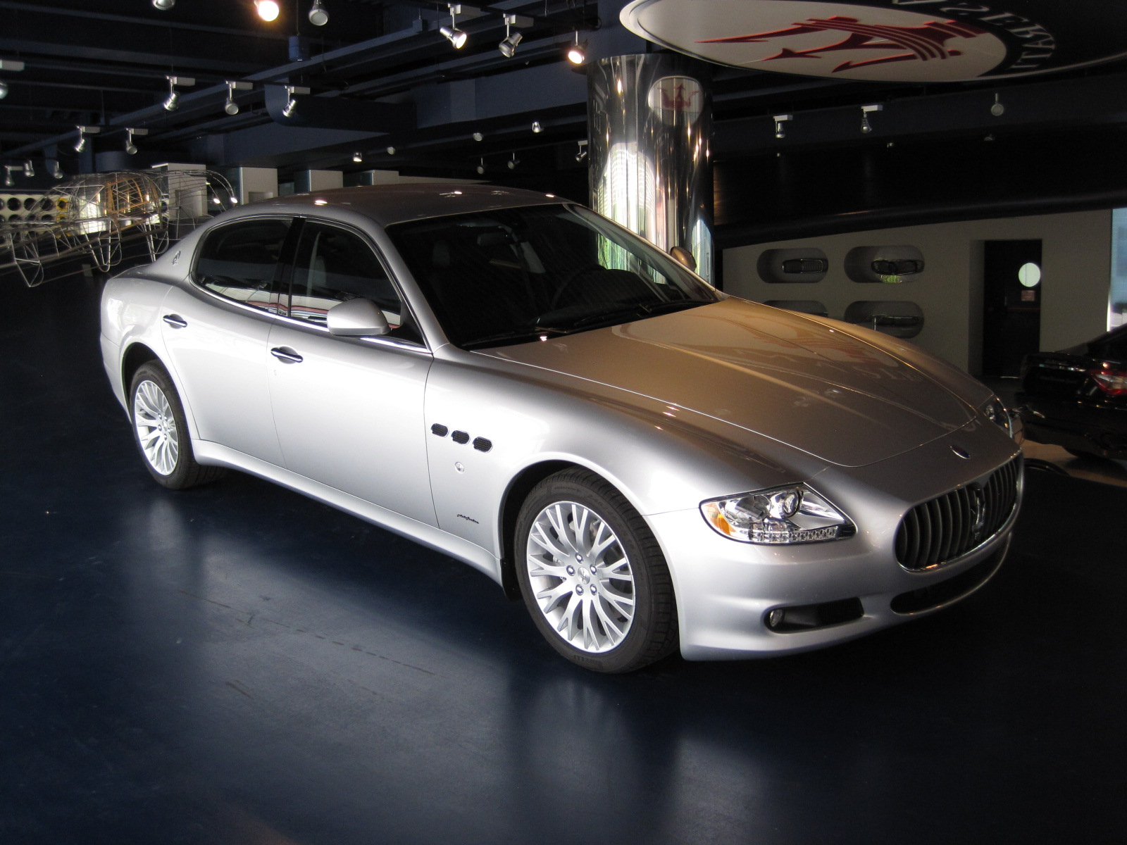 Maserati Showroom Modène